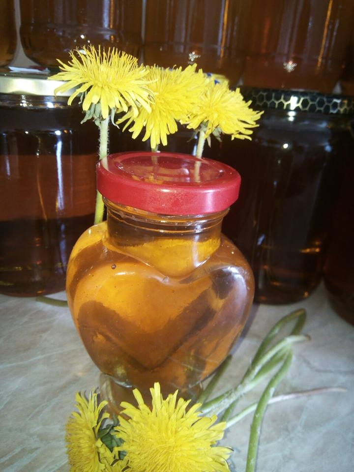 Med od maslacka.